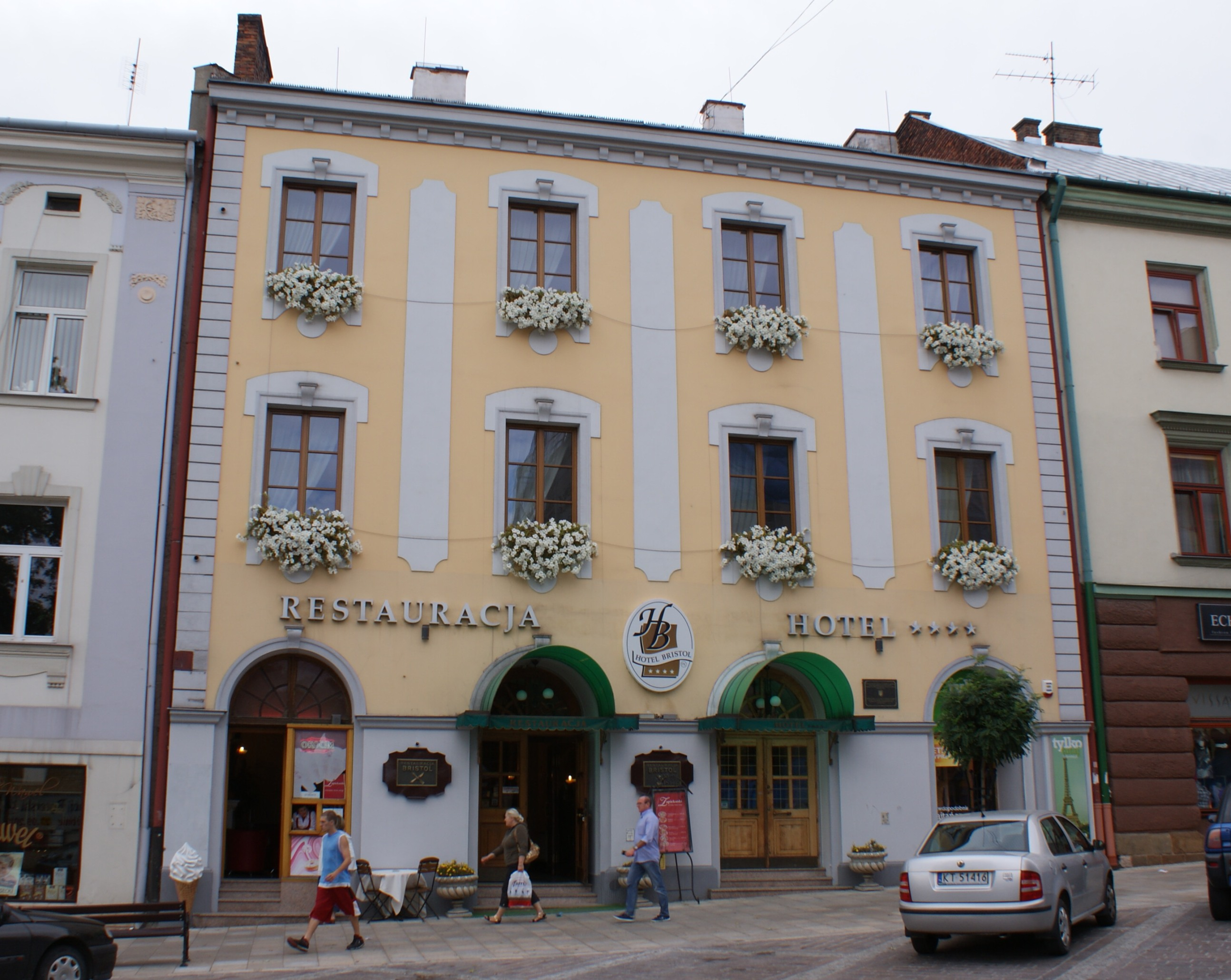 Tarnów, ul. Krakowska 9 / Nowy Świat 3 - kamienica, dawny Hotel "Bristol" wraz z zbudynkiem restauracji (zabytek nr A-415 z 07.05.1997)